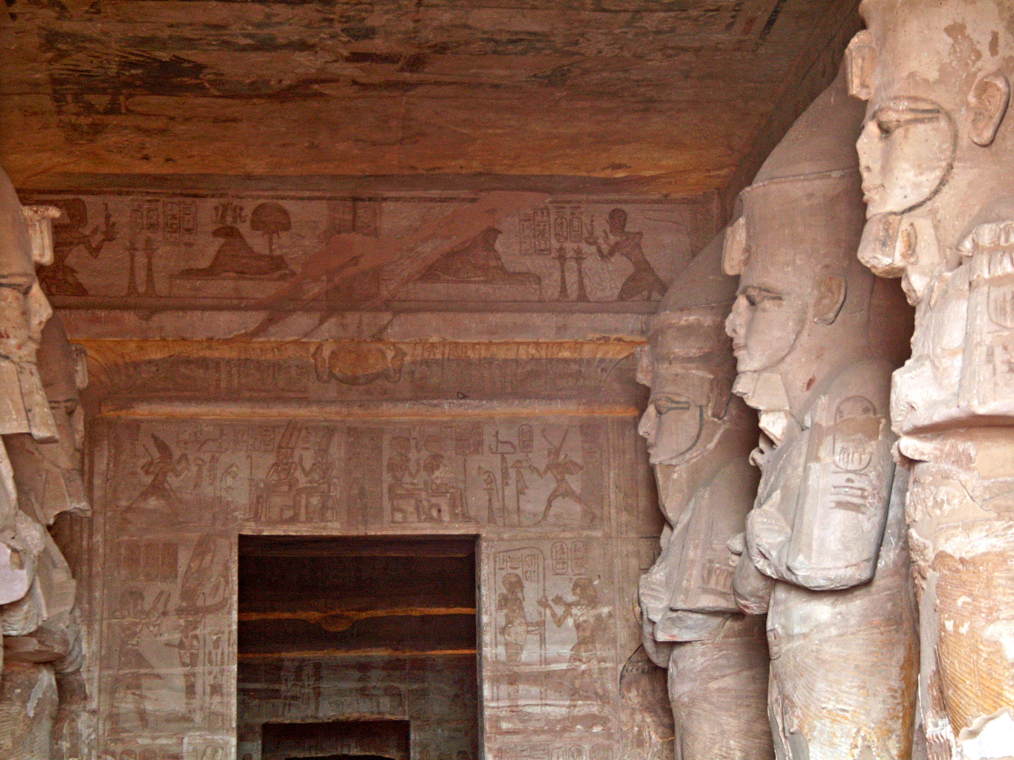 À l'entrée du grand temple d'Abou Simbel